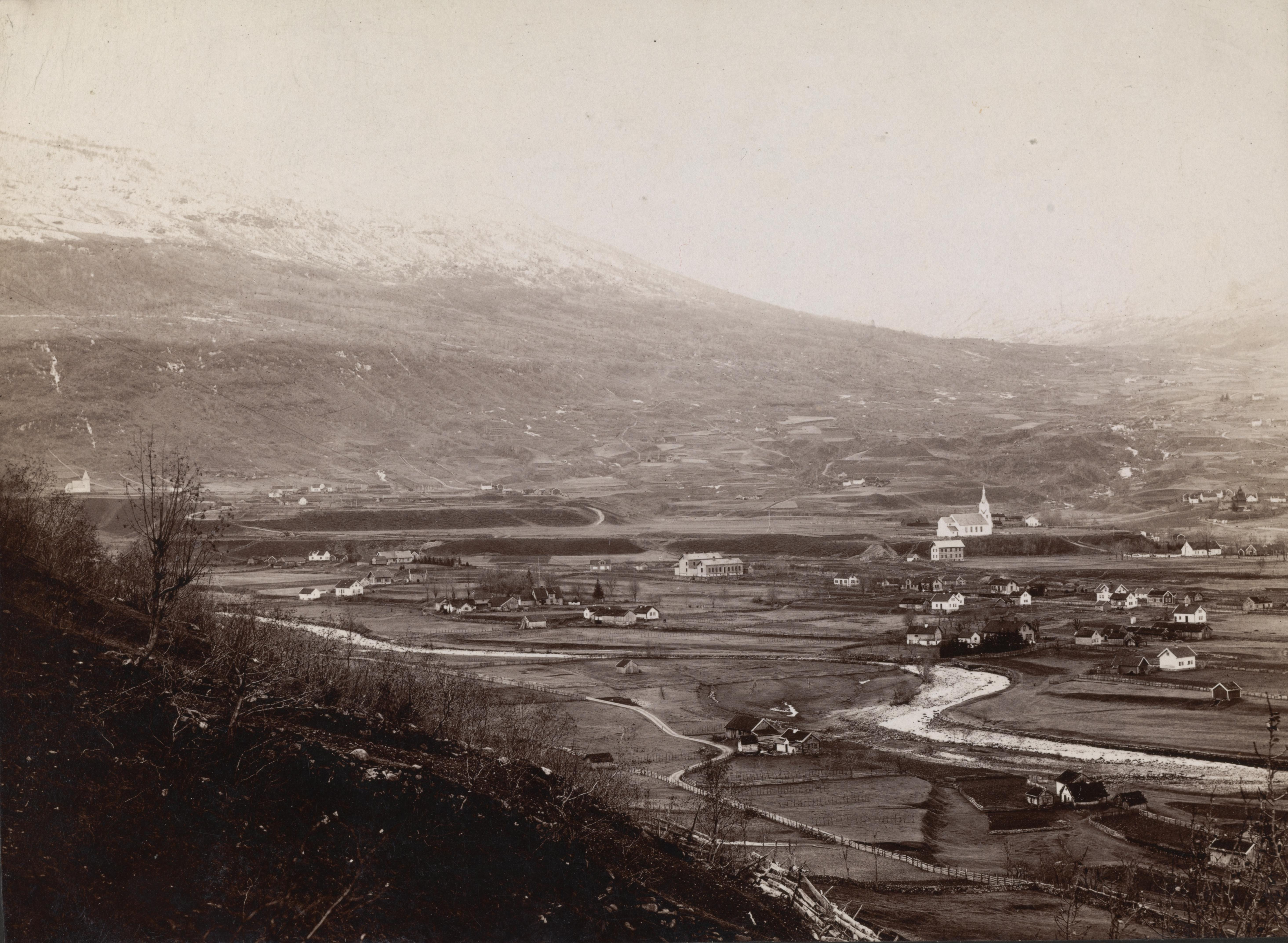 Bildet er hentet fra Nasjonalbibliotekets bildesamling Sogn og Fjordane, Vik. I bildet sees Vik kirke.